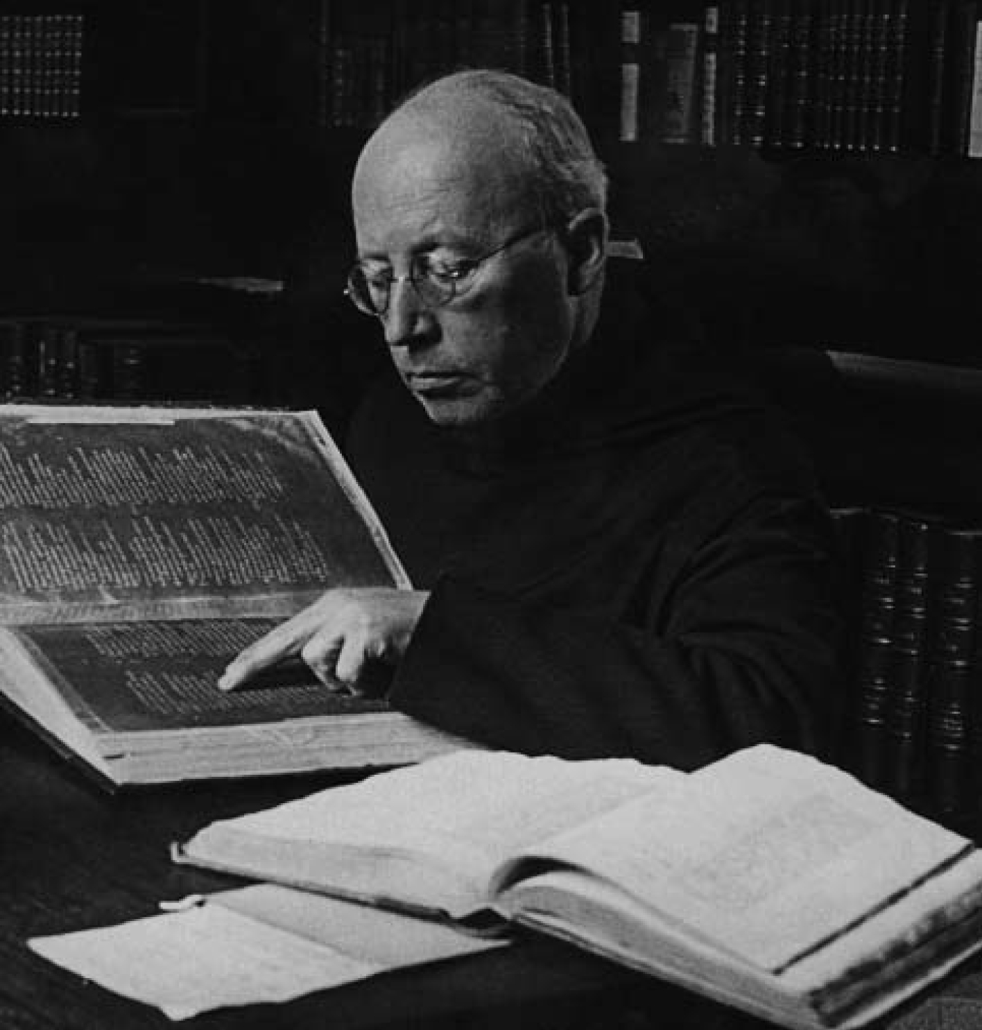 Henri Quentin (1872-1935)